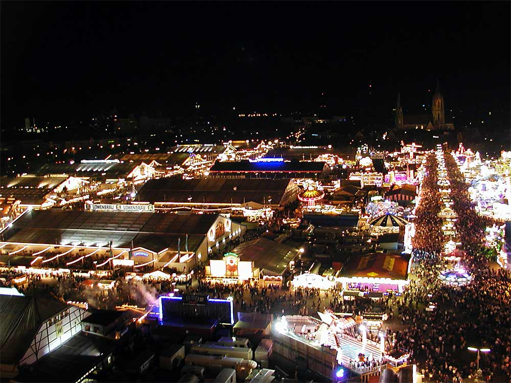 Oktoberfest at night